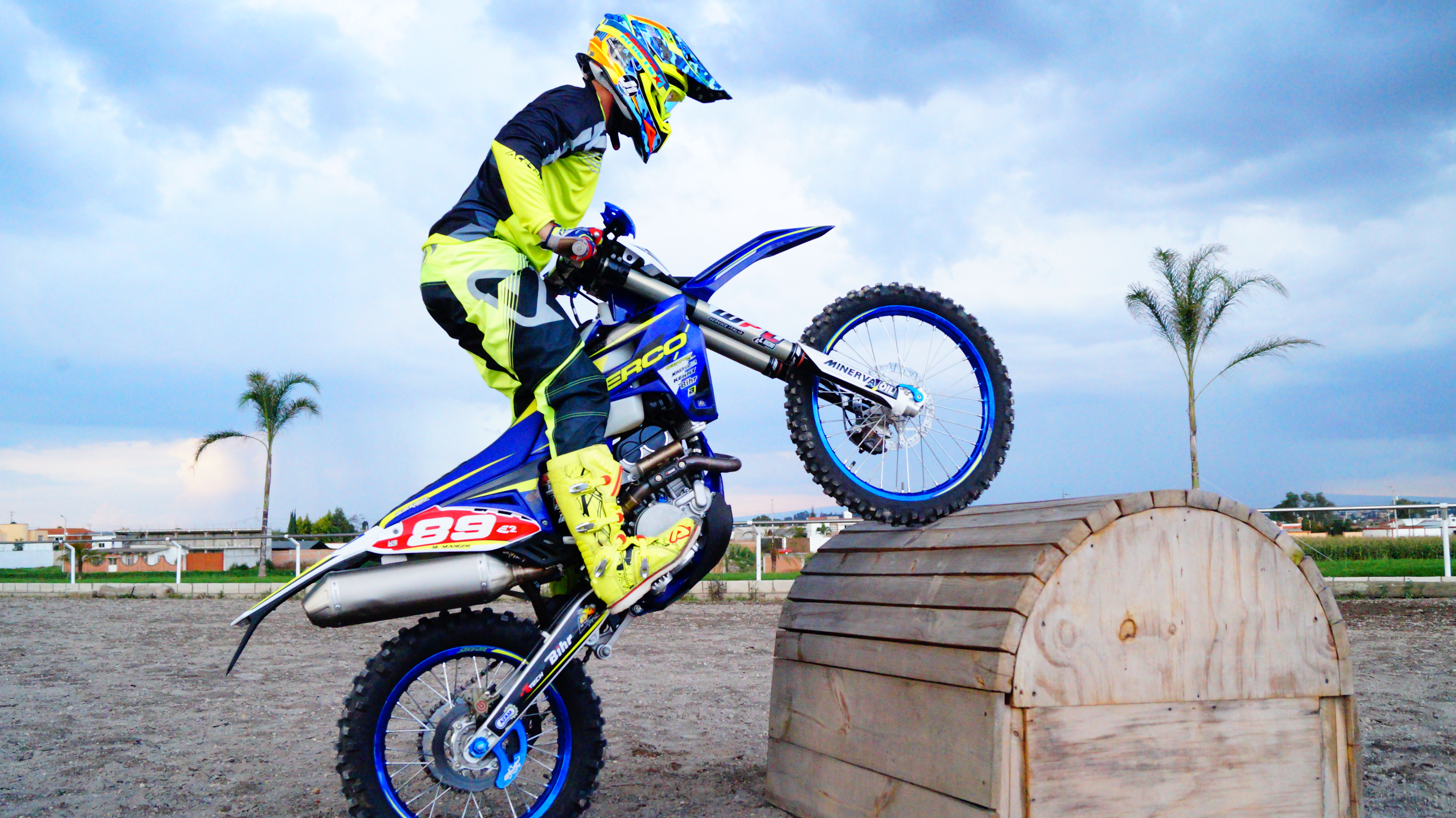 Pasión por el deporte